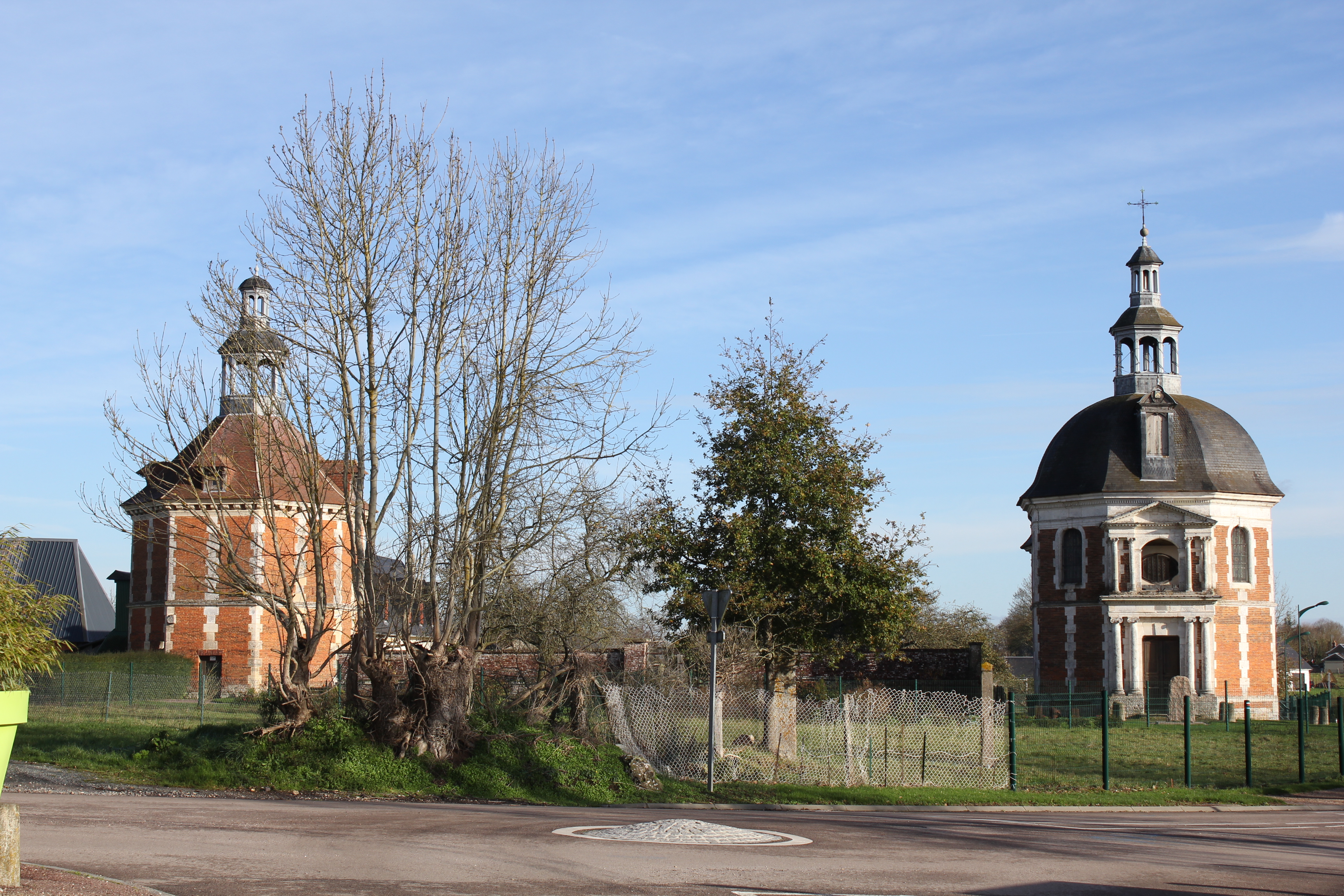 Manneville-sur-Risle Chapelle et Colombier du château de Bonneboscq.